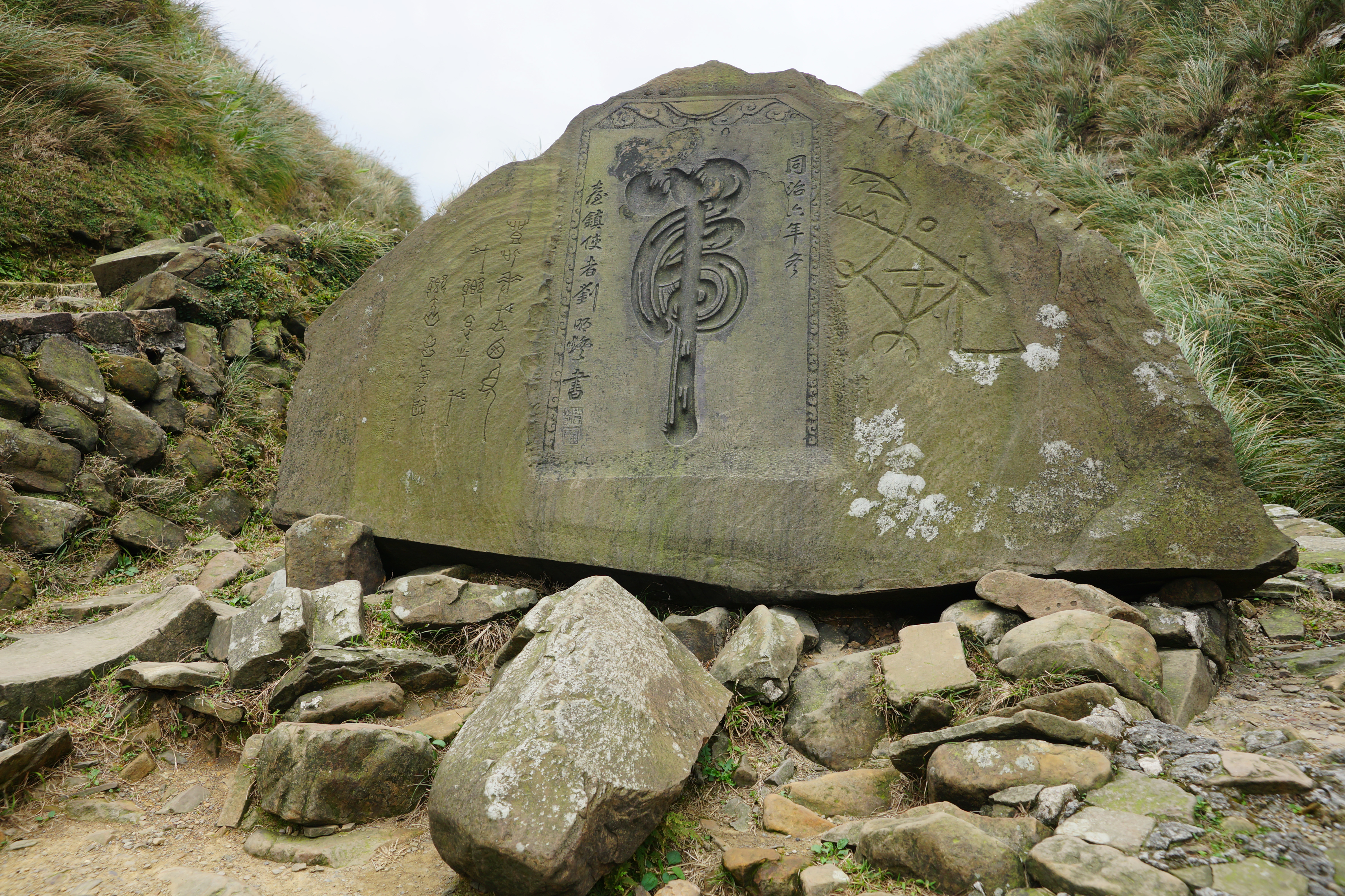 貢寮虎字碑。 Bân-lâm-gú: Kòng-liâu Hóo-jī-pi